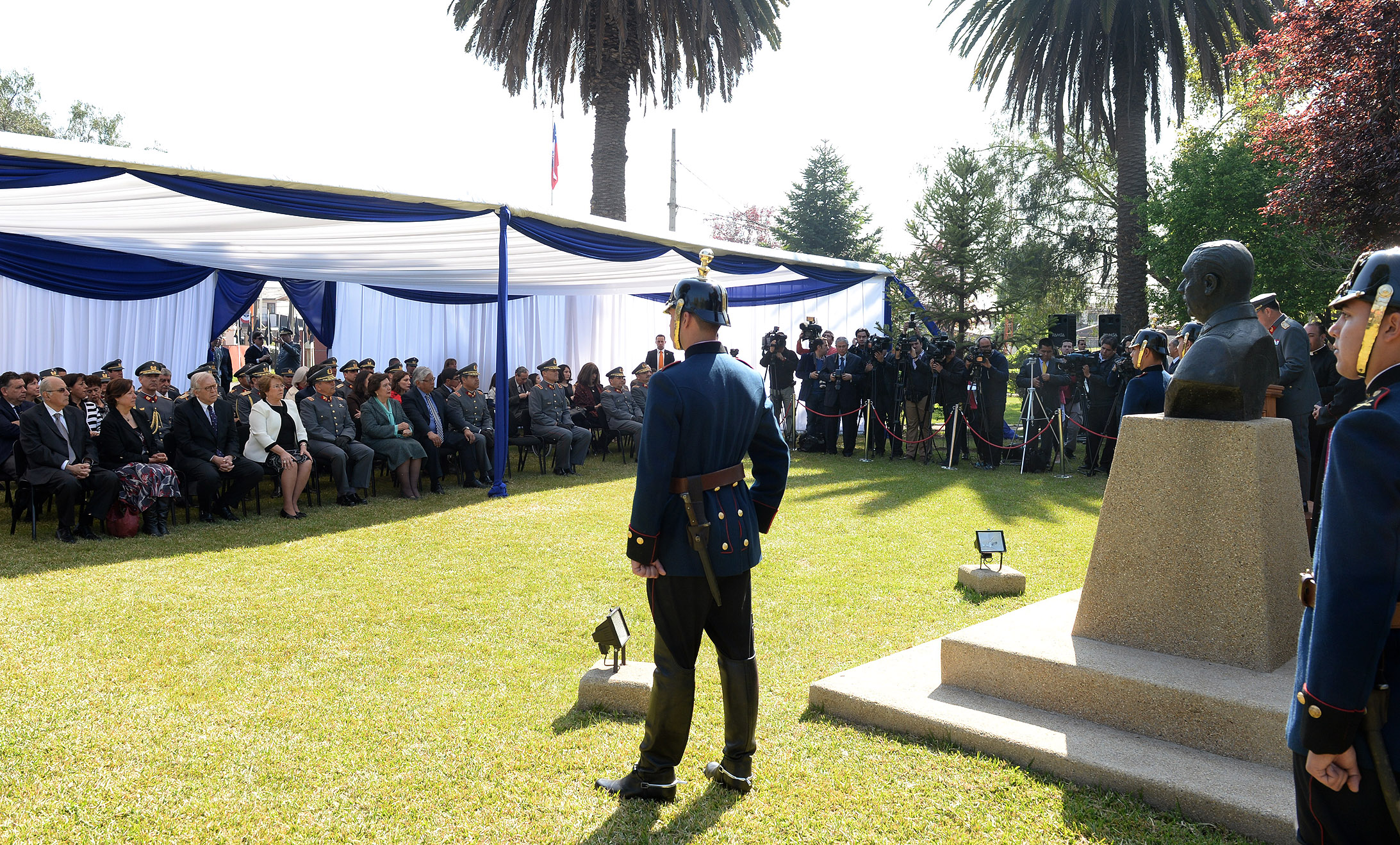 Gobierno de Chile. Presidenta Bachelet asistió al responso en memoria del ex Comandante en Jefe del Ejército, General Carlos Prats y su esposa, Sofía Cuthbert